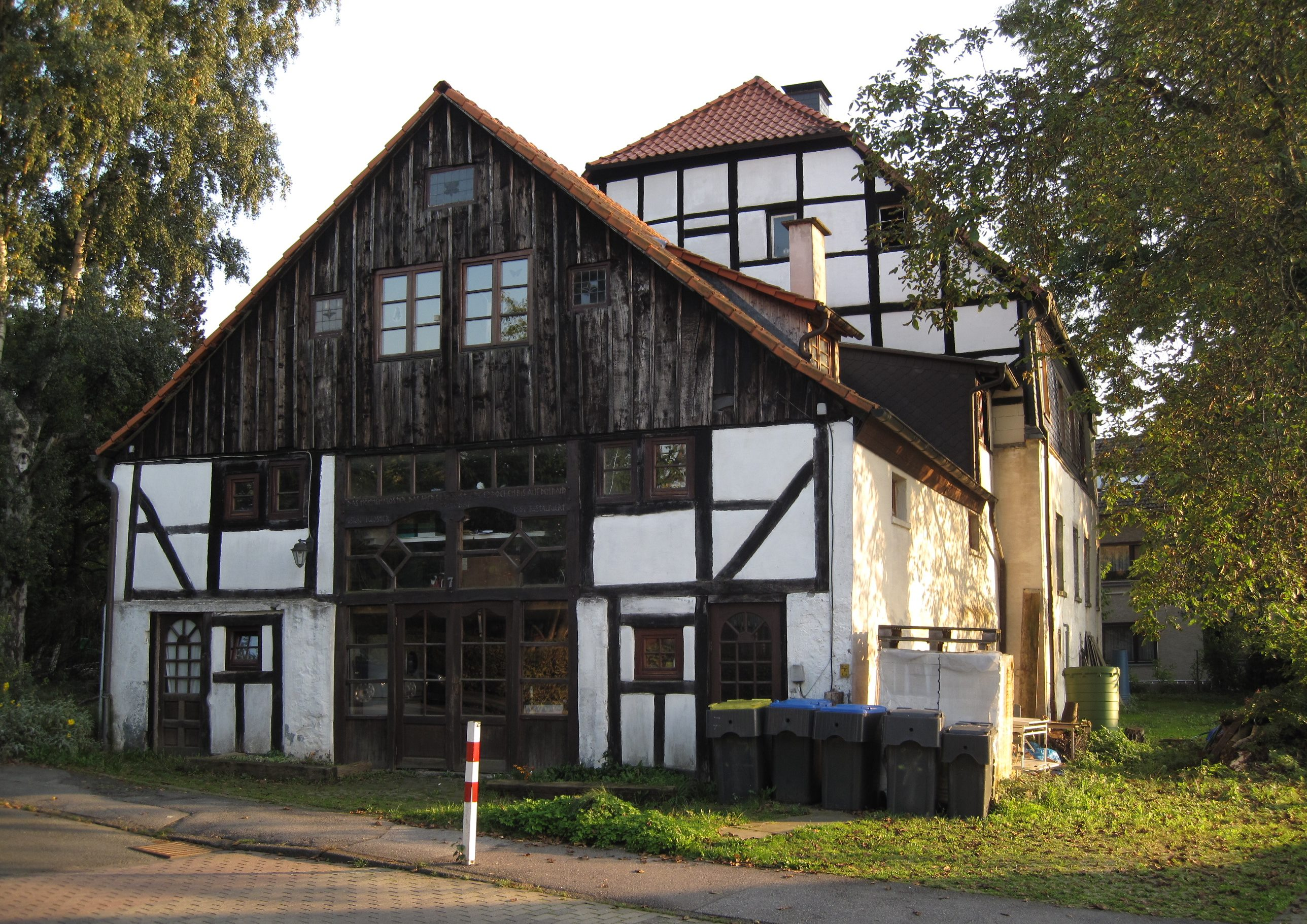 Wohnhaus mit Stallanbau (ehemaliges Pastorat) in Hemer-Deilinghofen. Baudenkmal seit 1983.